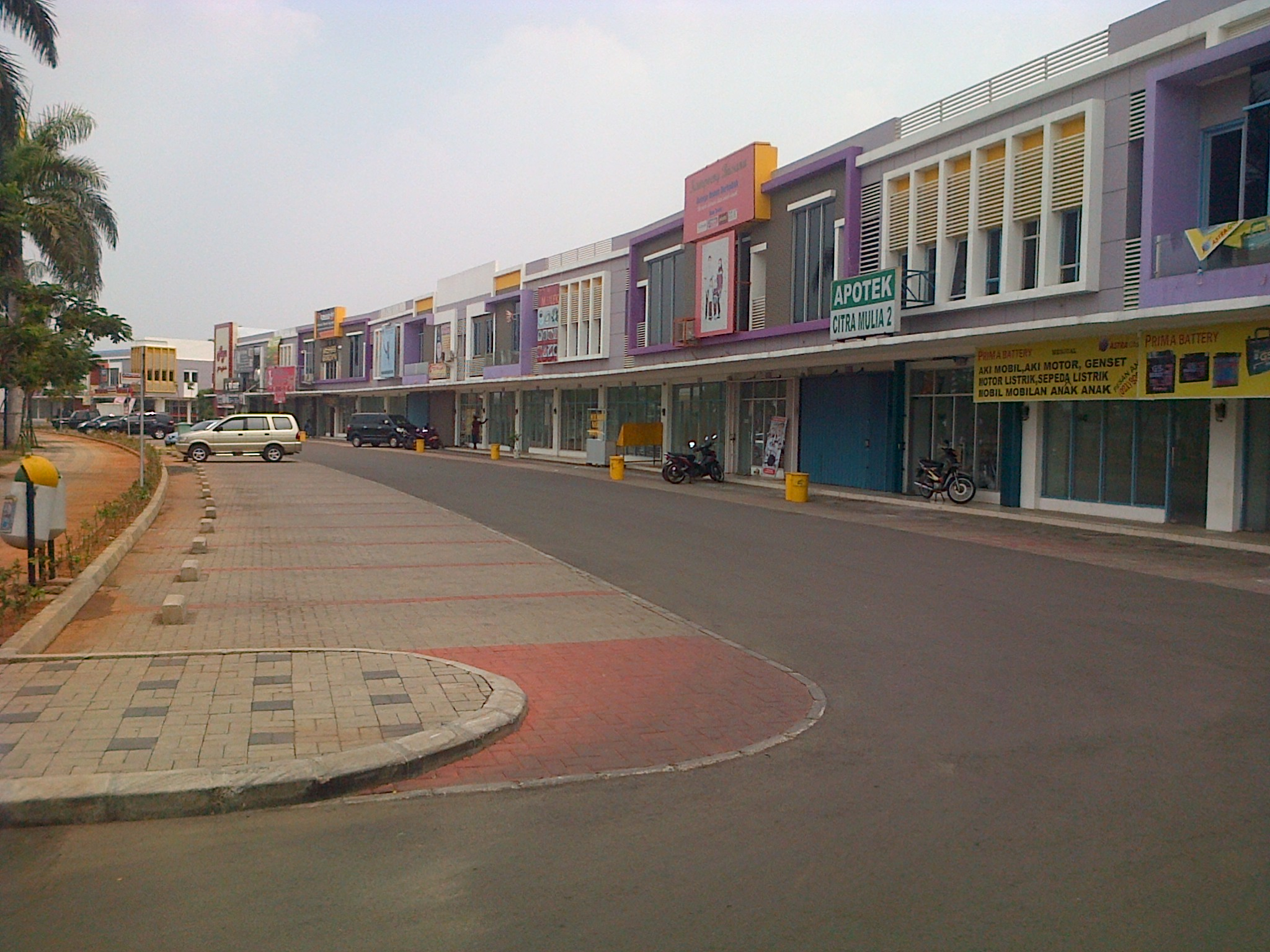 RUKO PARK VIEW CITRA RAYA CIKUPA TANGERANG